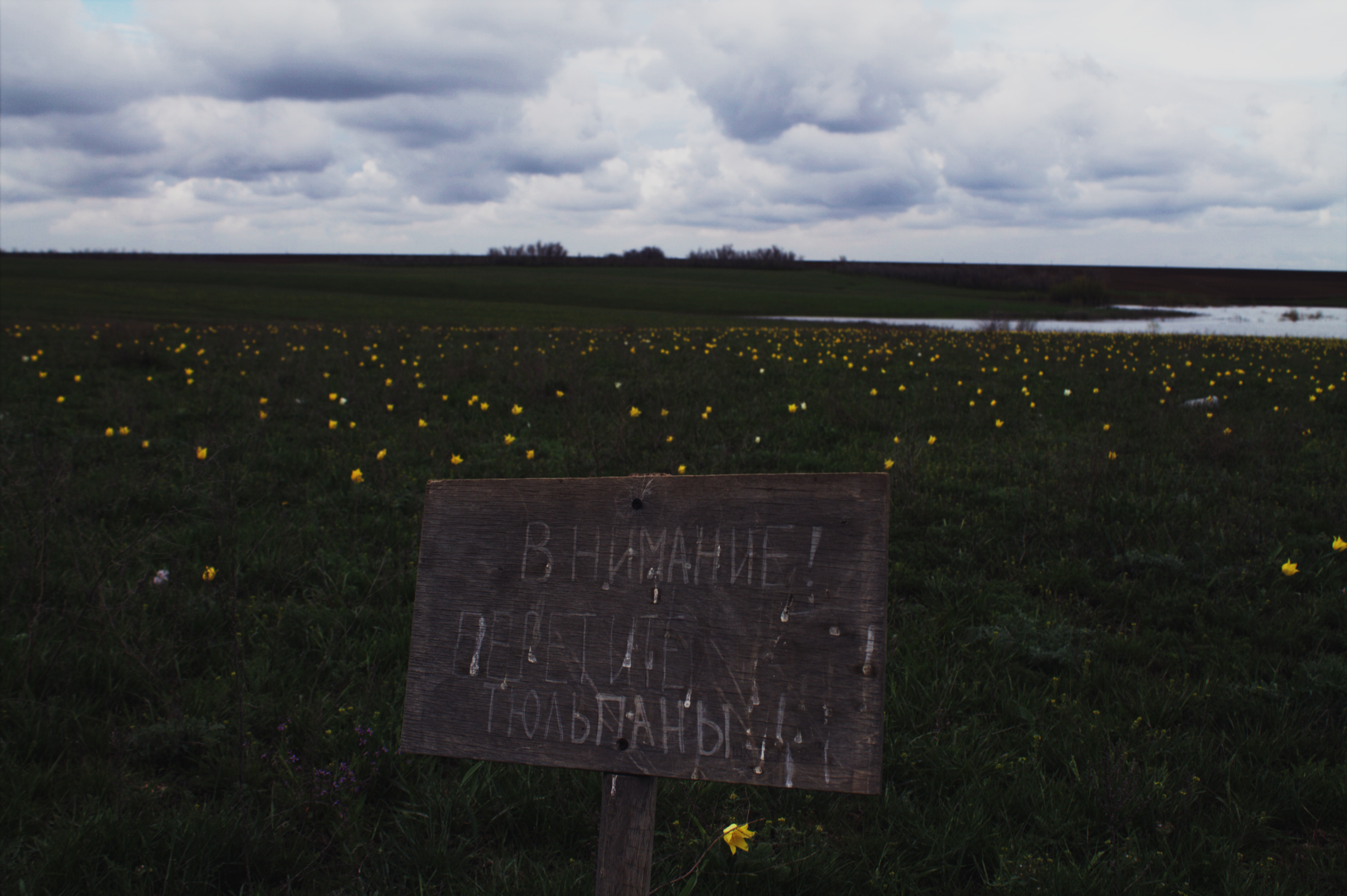 Тюльпанная степь: Пугачёвский район, Саратовская область This image is related to the protected area of Russia number 6410110